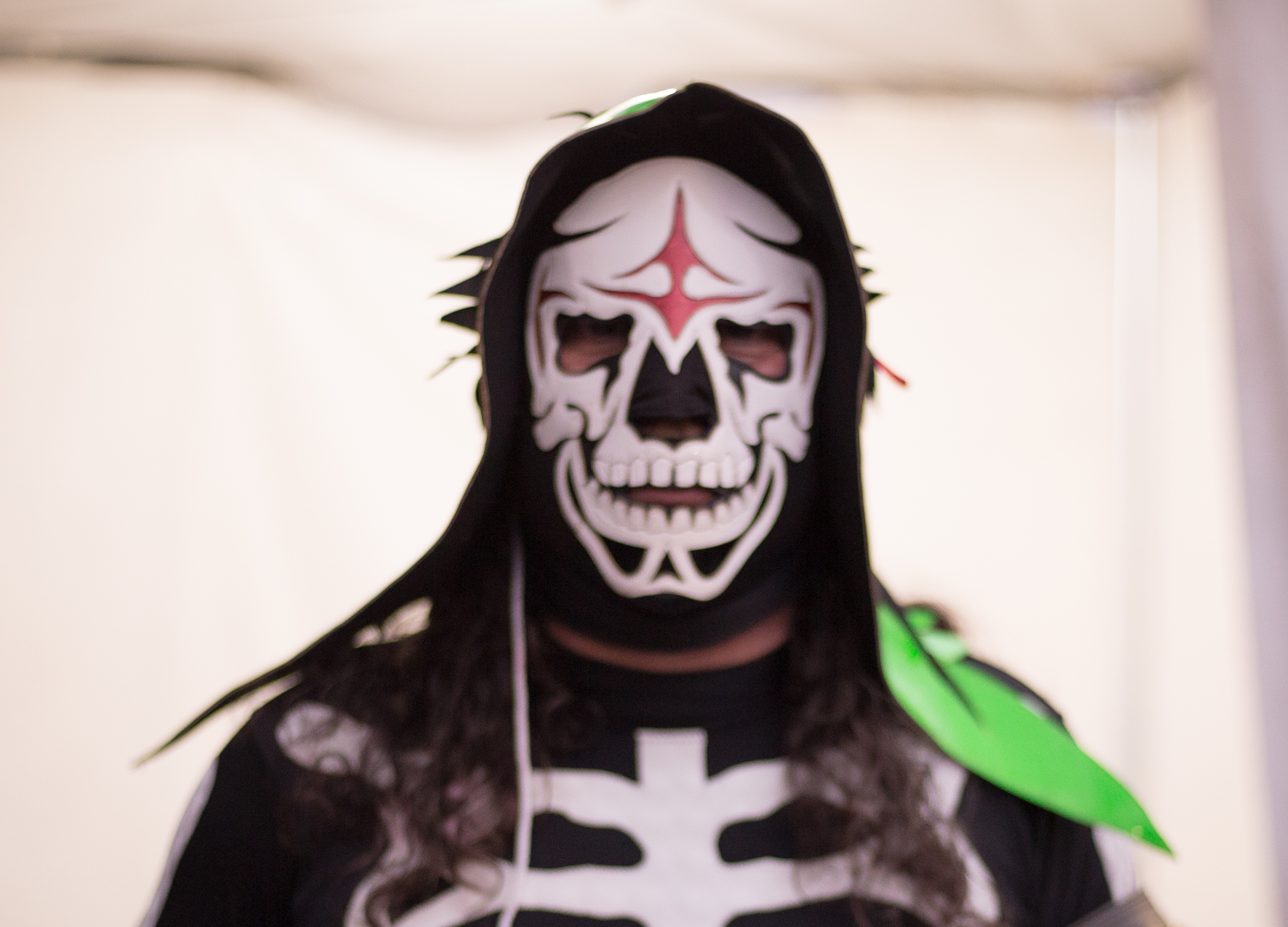 La Parka (Jesús Alfonso Huerta Escoboza) en 2019.